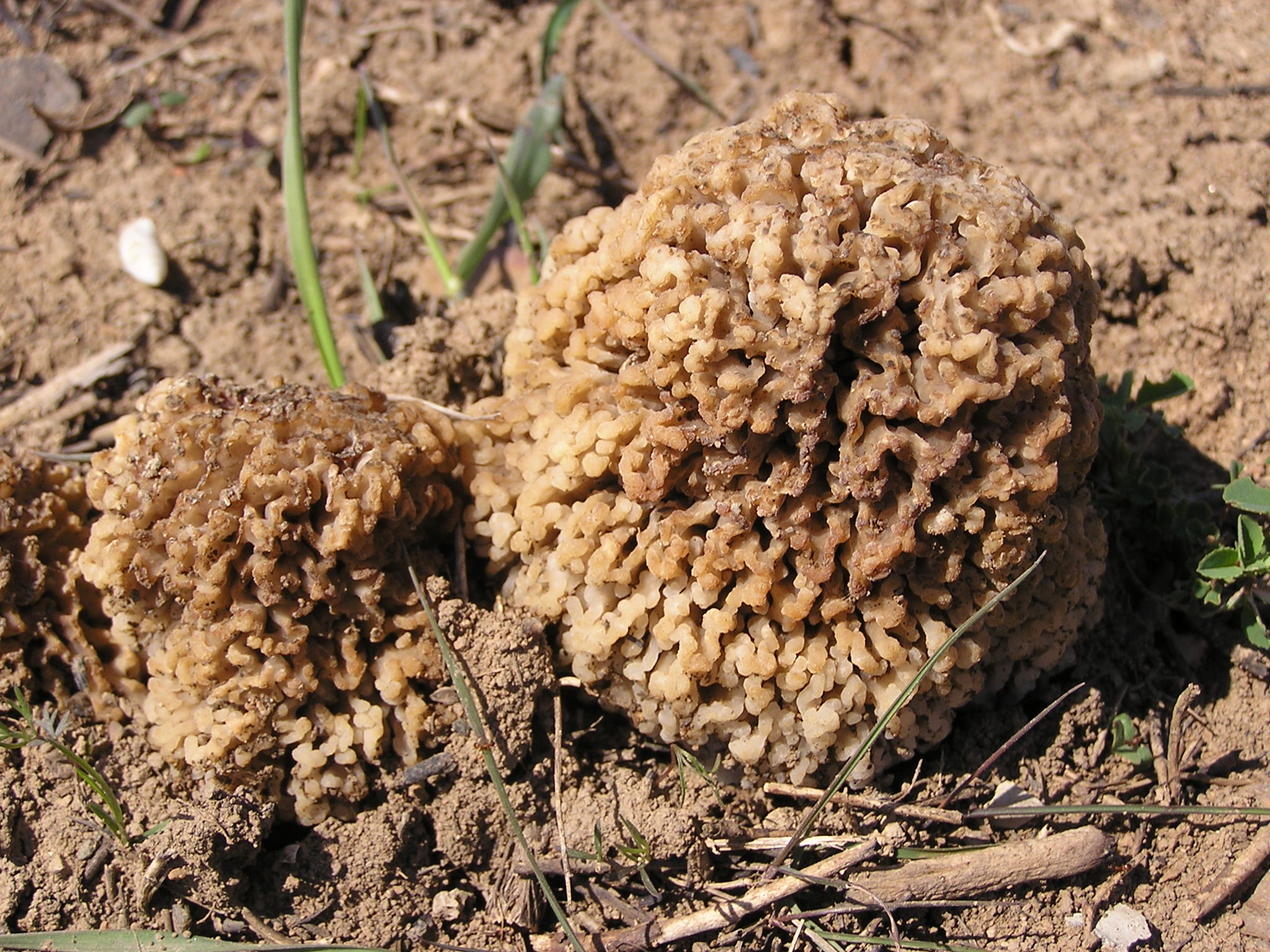 Гриб в Донецке